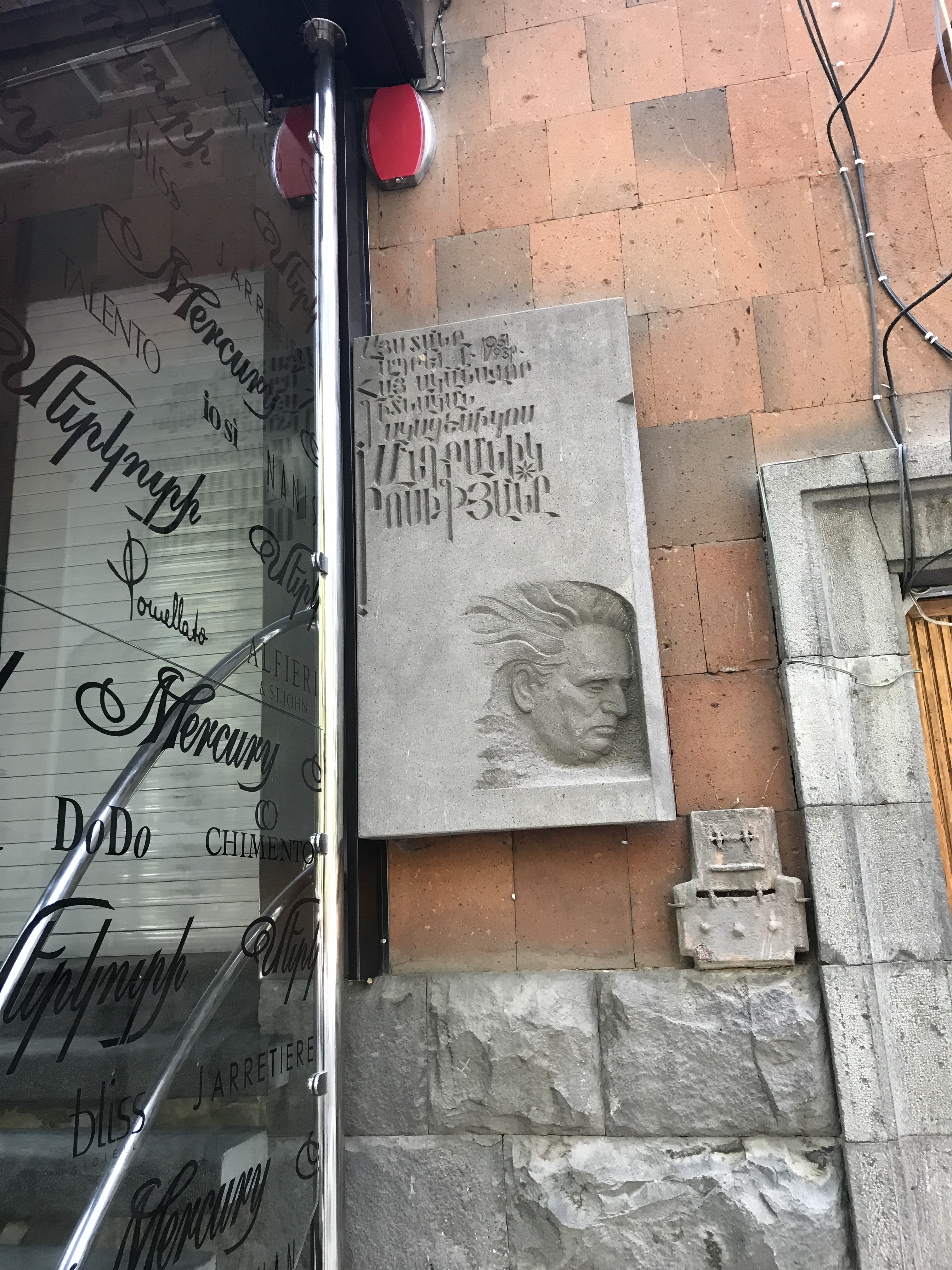 Image d'Erevan en juillet 2017. Sujet divers..